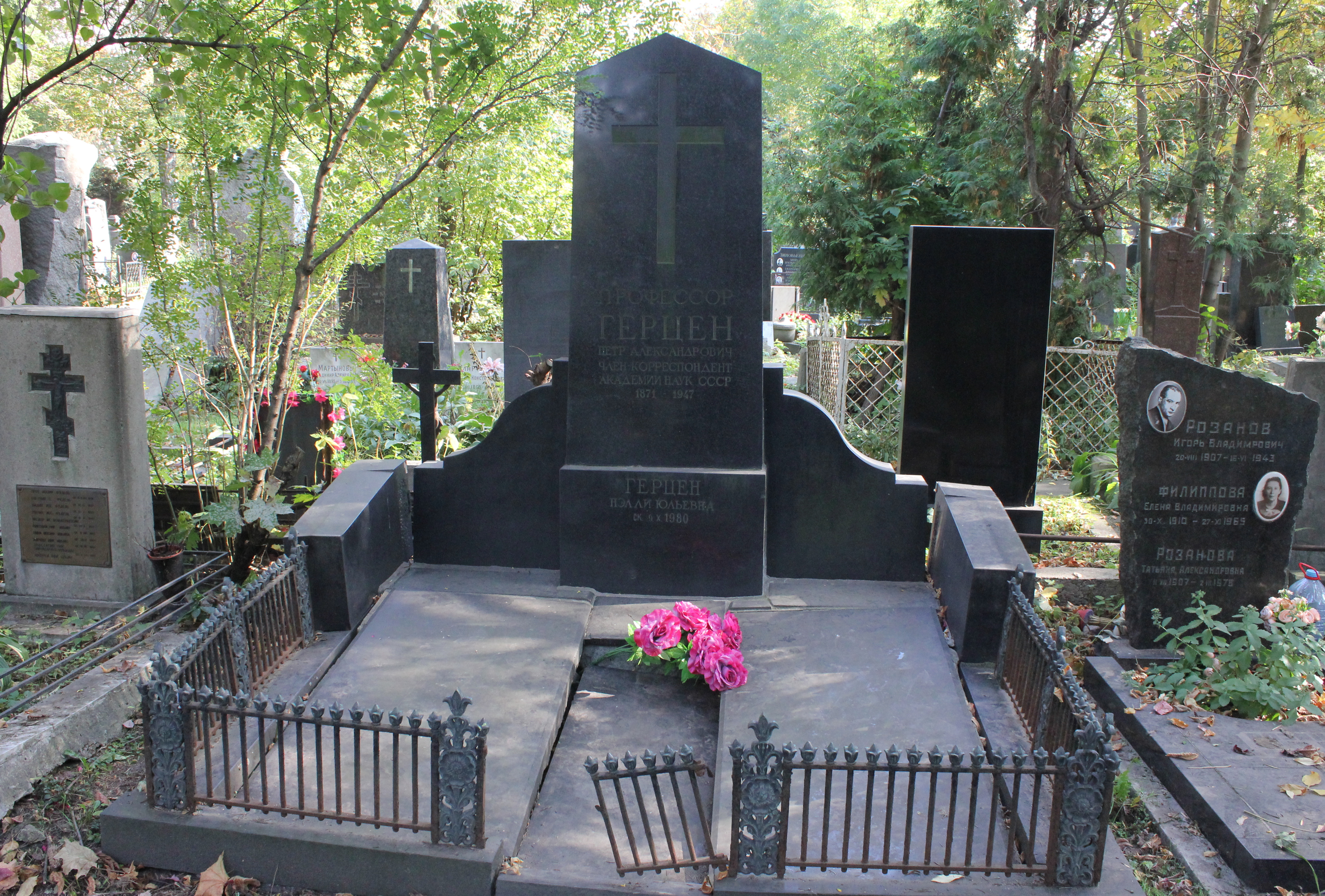 Могила Герцена Петра Александровича (1871-1947): Новодевичье кладбище, Хамовники, Центральный округ, Москва